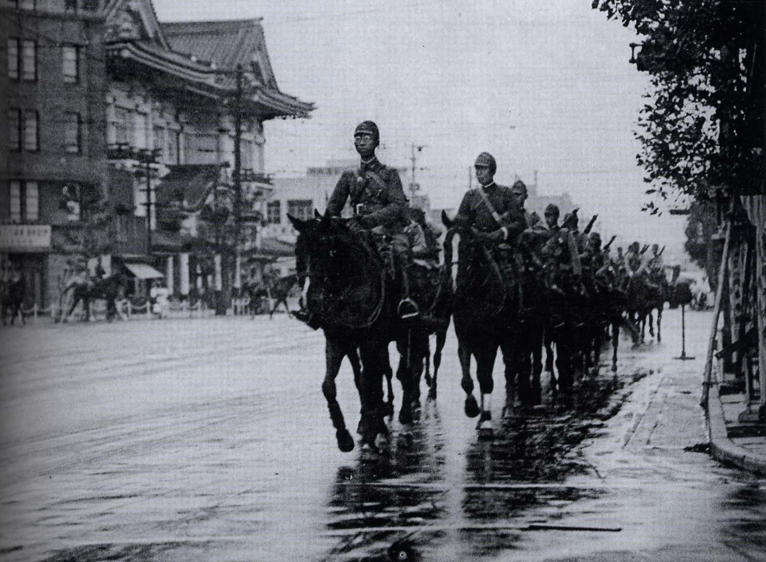 第二期検閲行軍（京橋区木挽町三丁目歌舞伎座前通過中）, 昭和13年